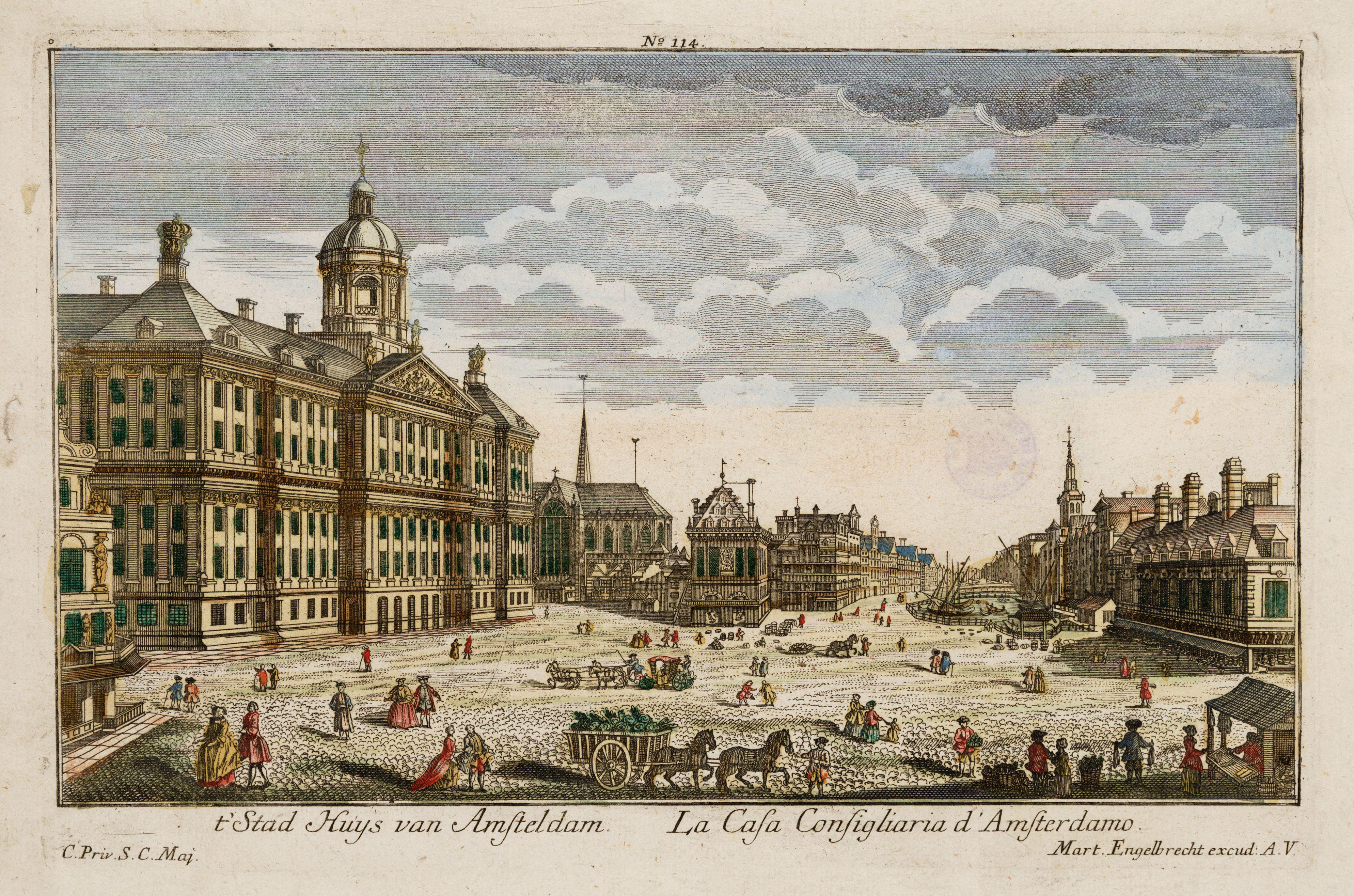 Dam, Amsterdam